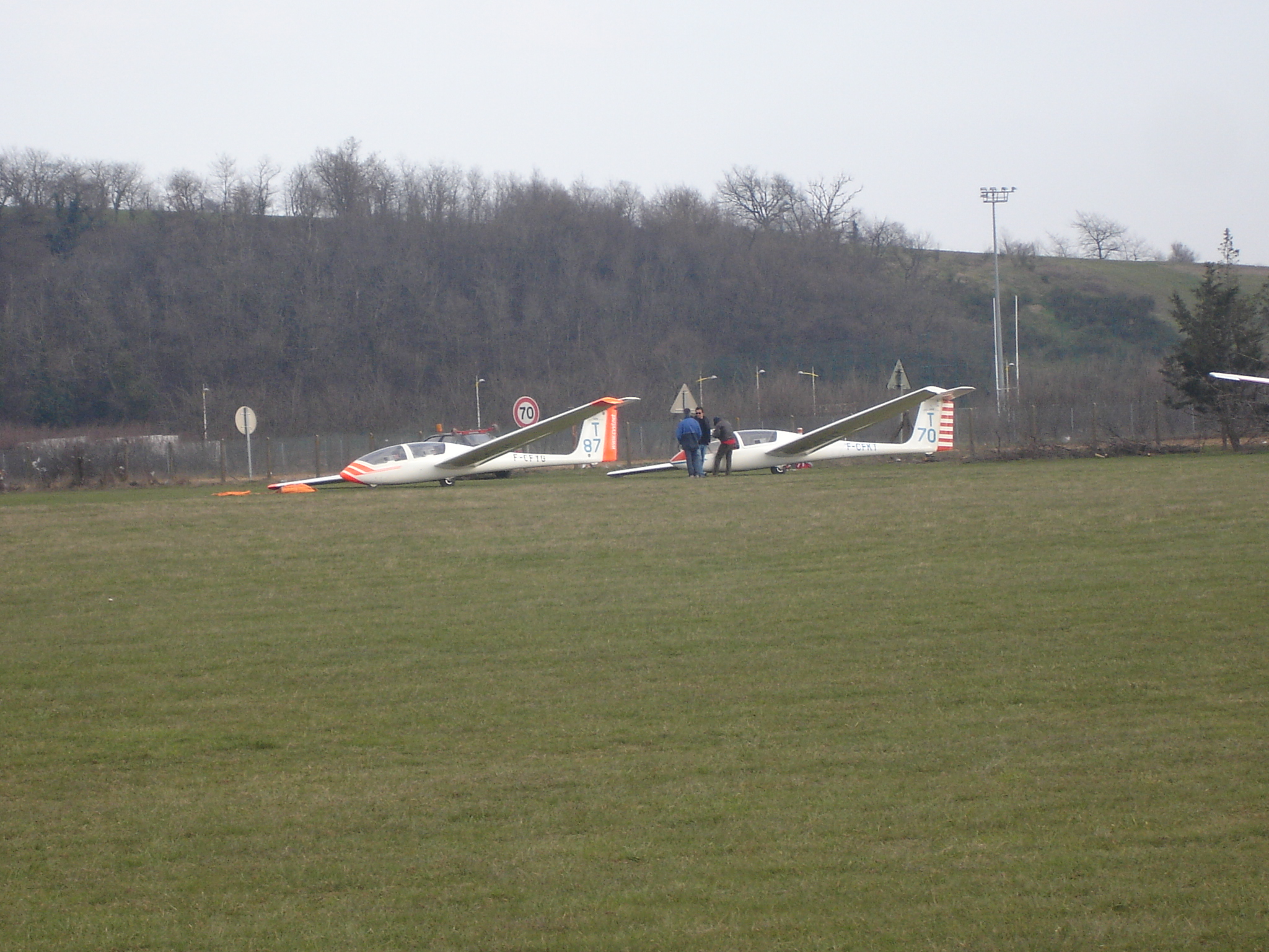 Corbas (69) : planeurs dans le terrain d'aviation